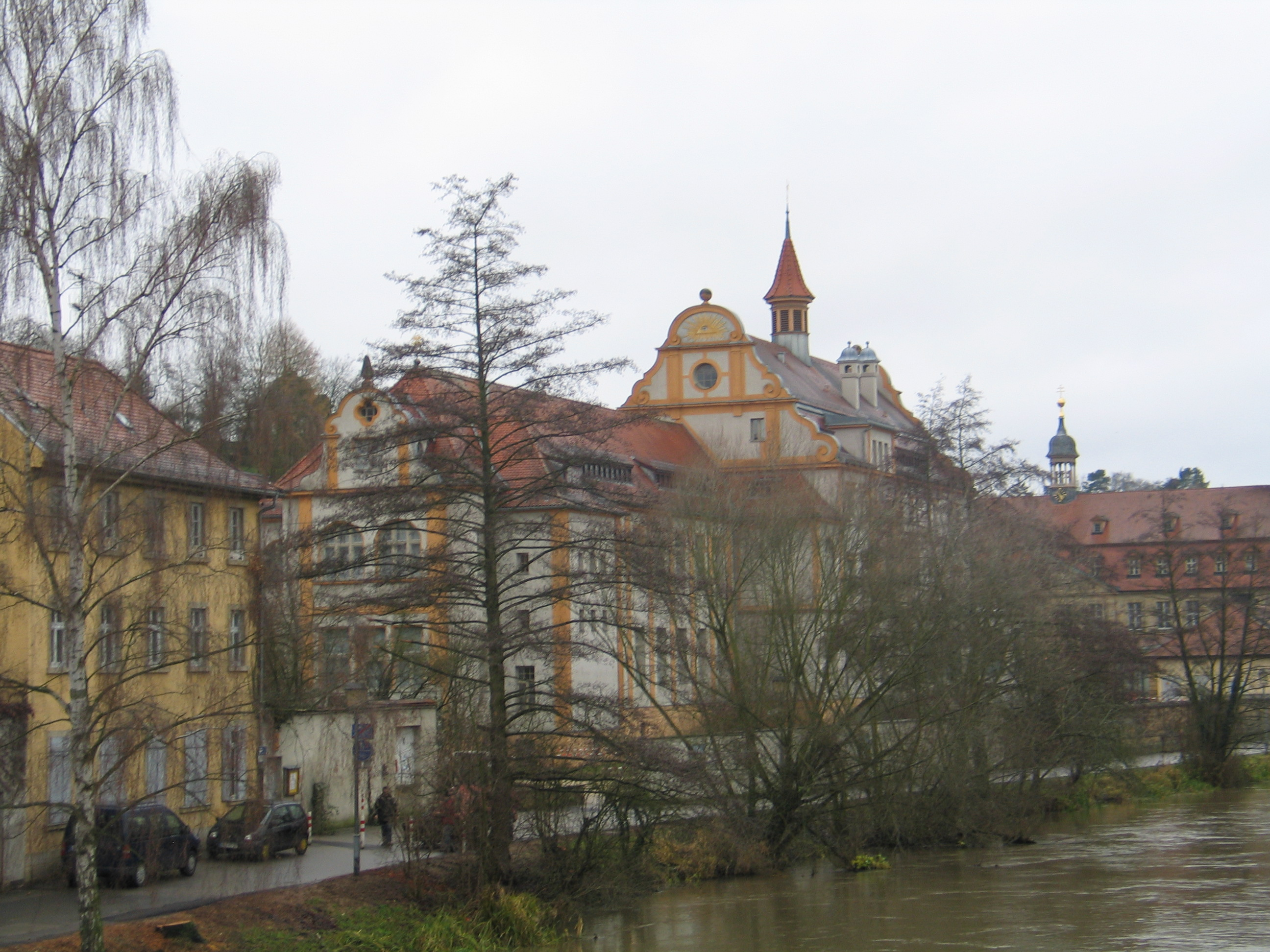 Blick auf Linker Regnitzarm